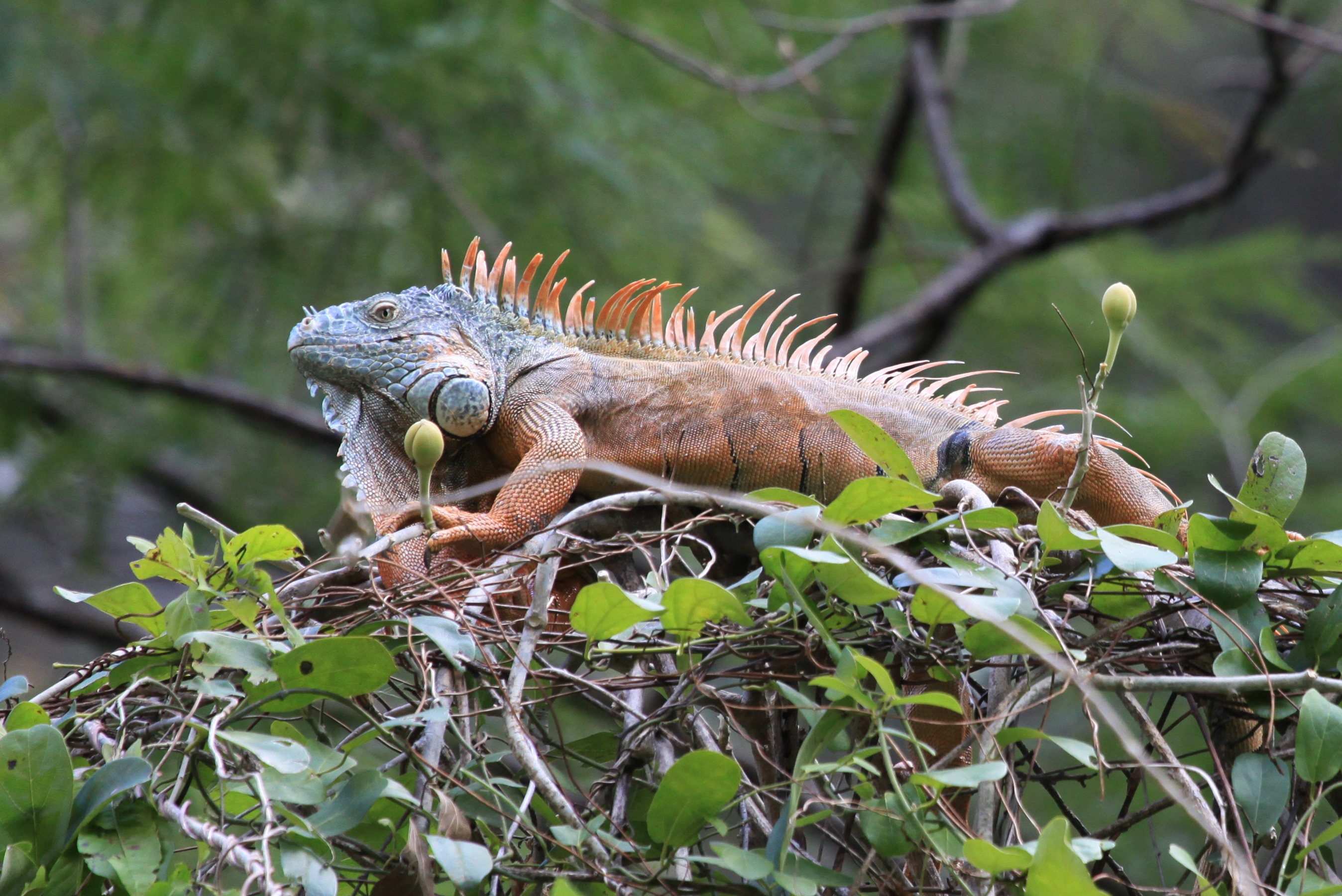 Iguana Verde -Iguana iguana- Green Iguana en el Cañón del Sumidero en Chiapas México. El color anaranjado que muestra este macho es normal en la época de reproducción.